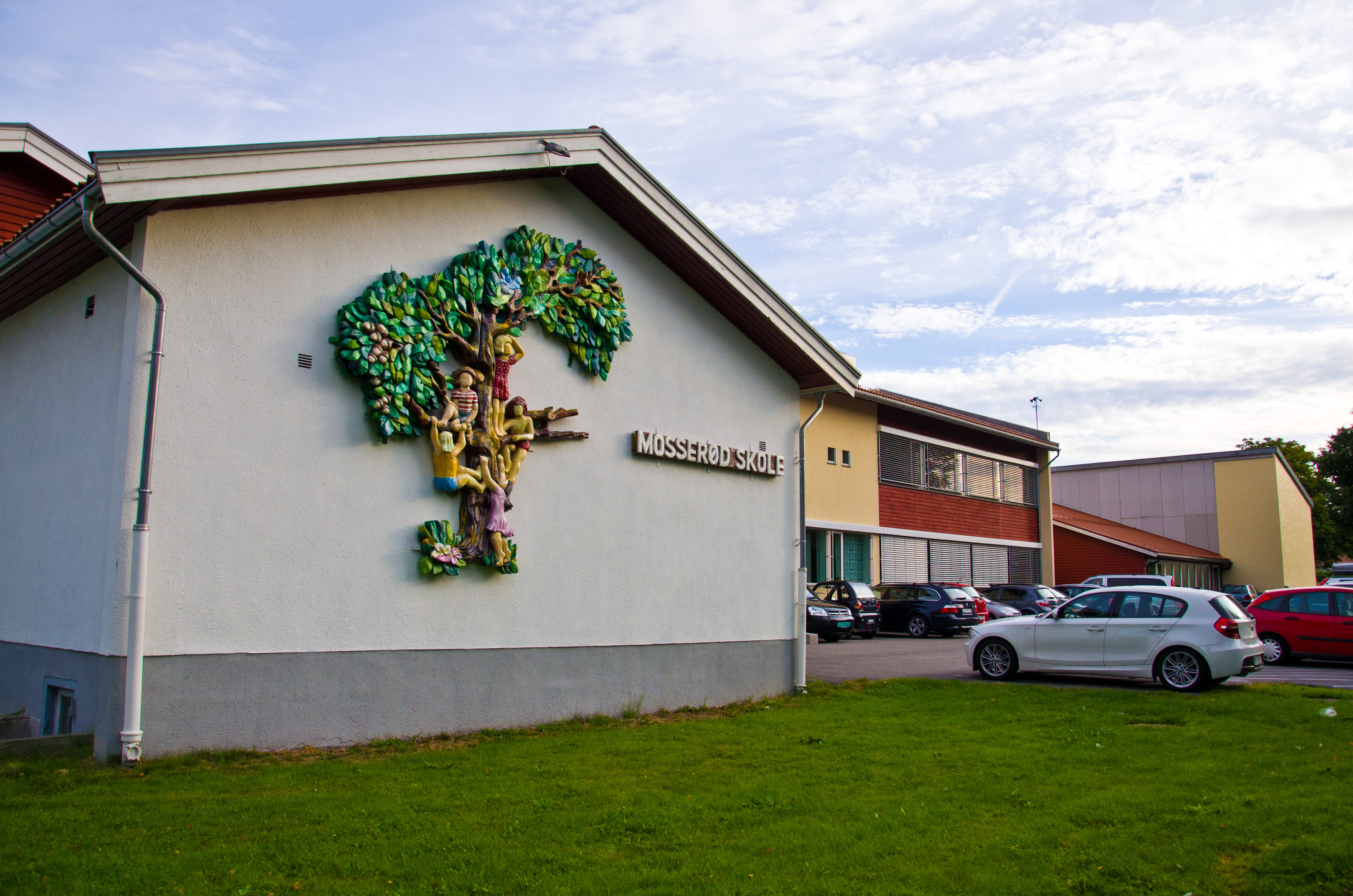 Mosserød skole i Sandefjord